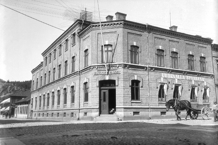 Foto från korsningen Kålgårdsbergsgatan - Kungsgatan.Till höger syns hörnhuset (byggt 1881, arkitekt och byggmästare Philip Jacob Rapp) där Bohusläns Enskilda Bank och Uddevalla Sparbank